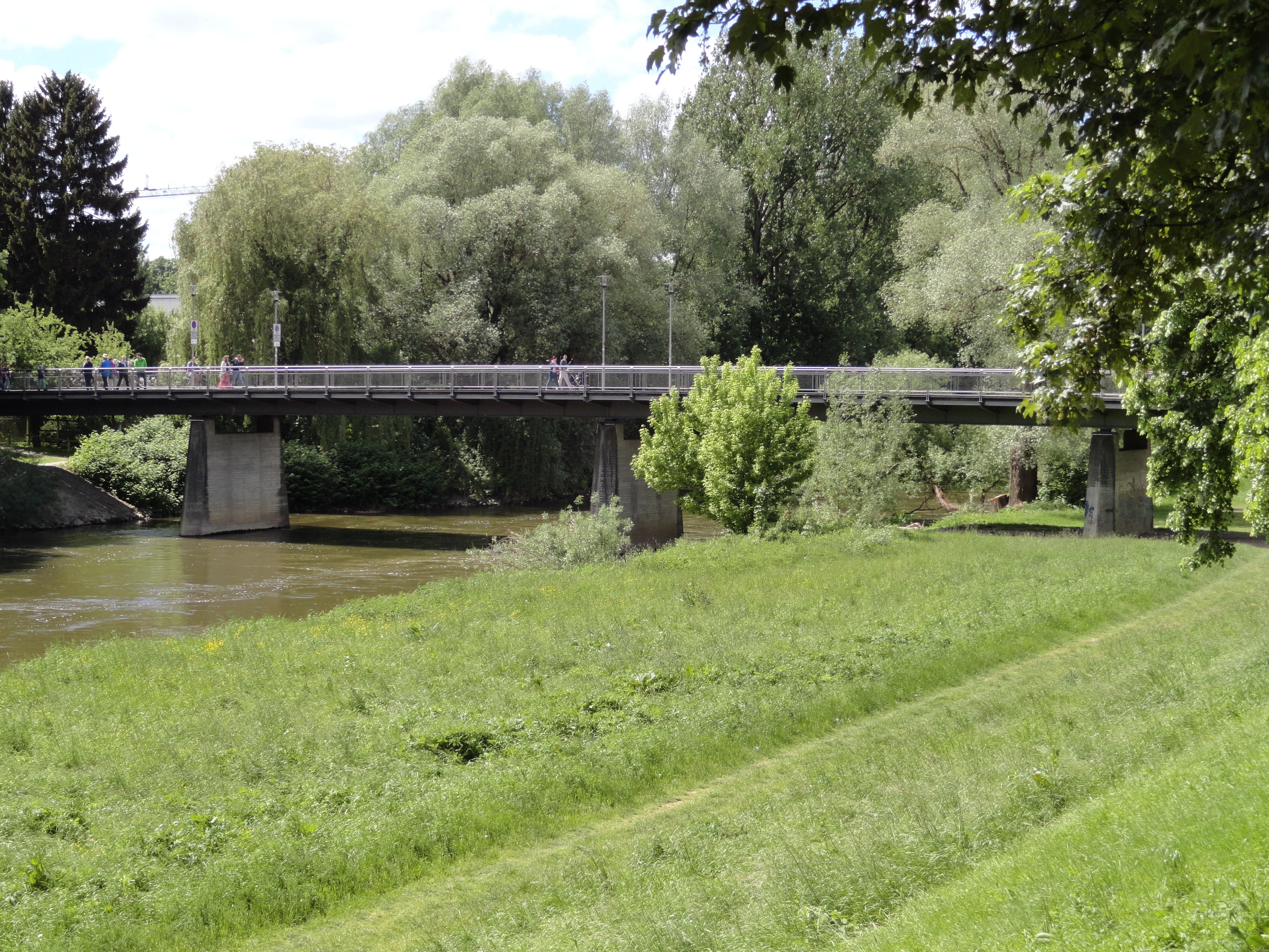 Pfaffensteiner Steg in Regensburg ueber die Donau